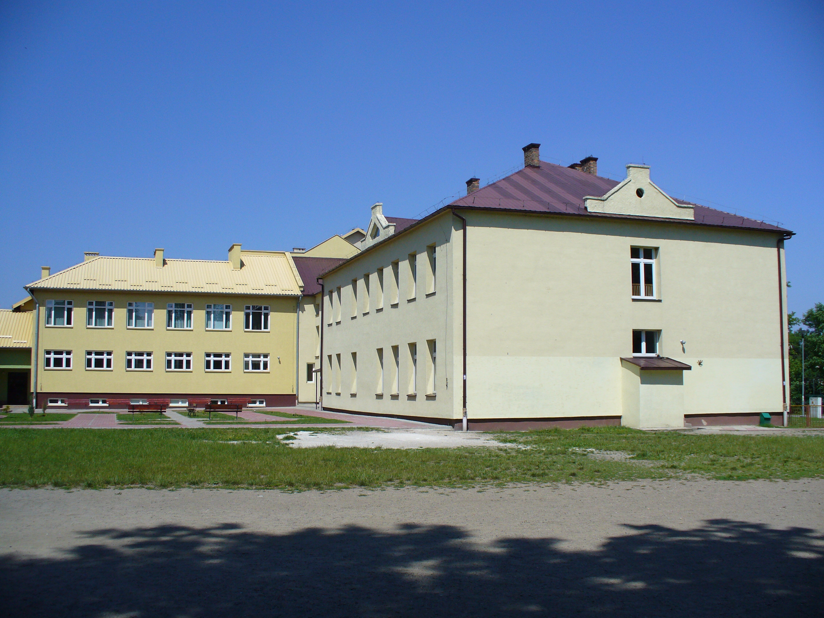 Besko - szkoła podst.